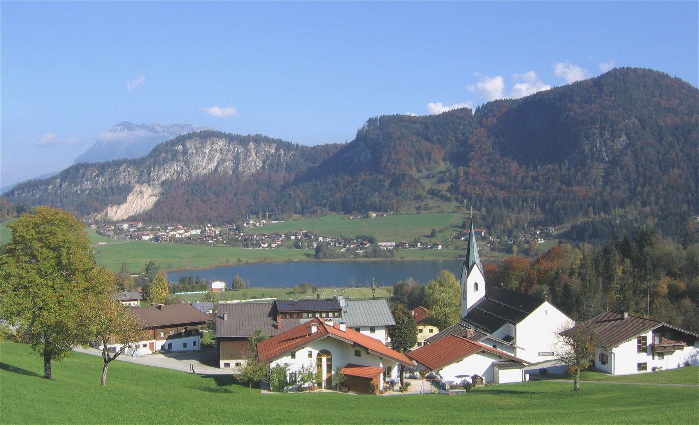 Thiersee mit dem Kirchberg in der Ortschaft Vorderthiersee